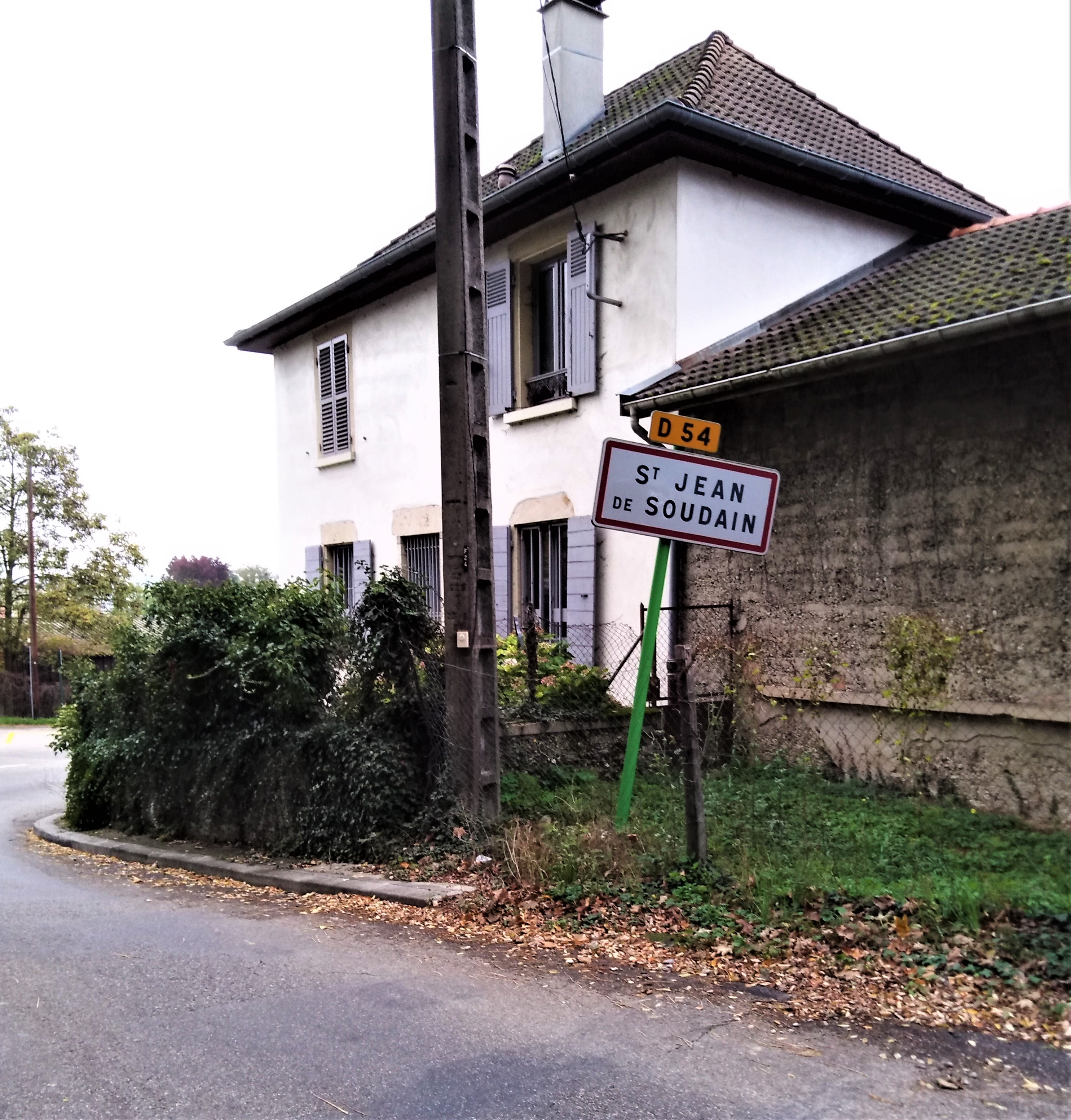 Panneau routier d'entrée de Saint-Jean de Soudain